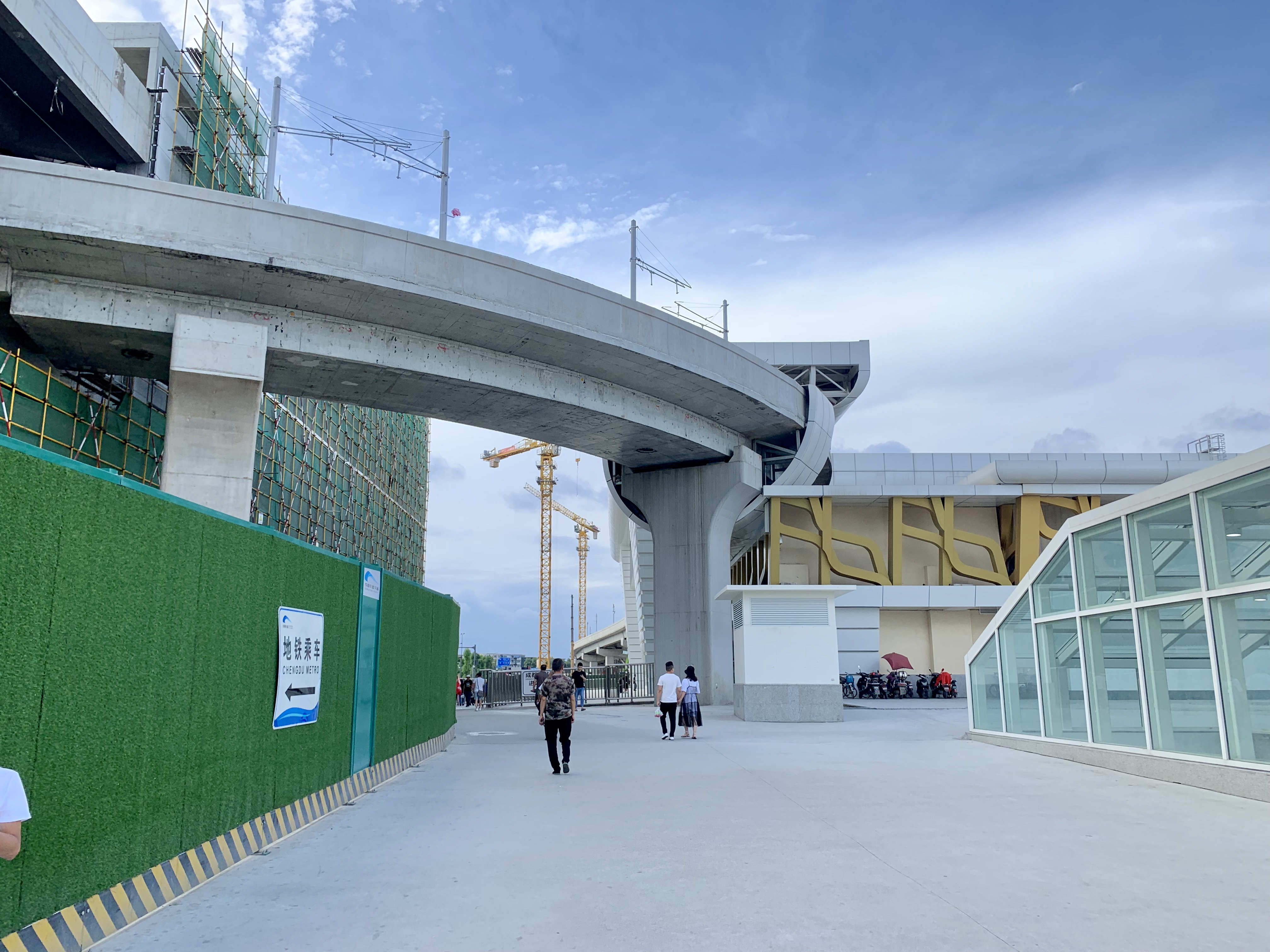 成都西站正面的有轨电车轨道桥，该桥部分被包裹在车站立面内